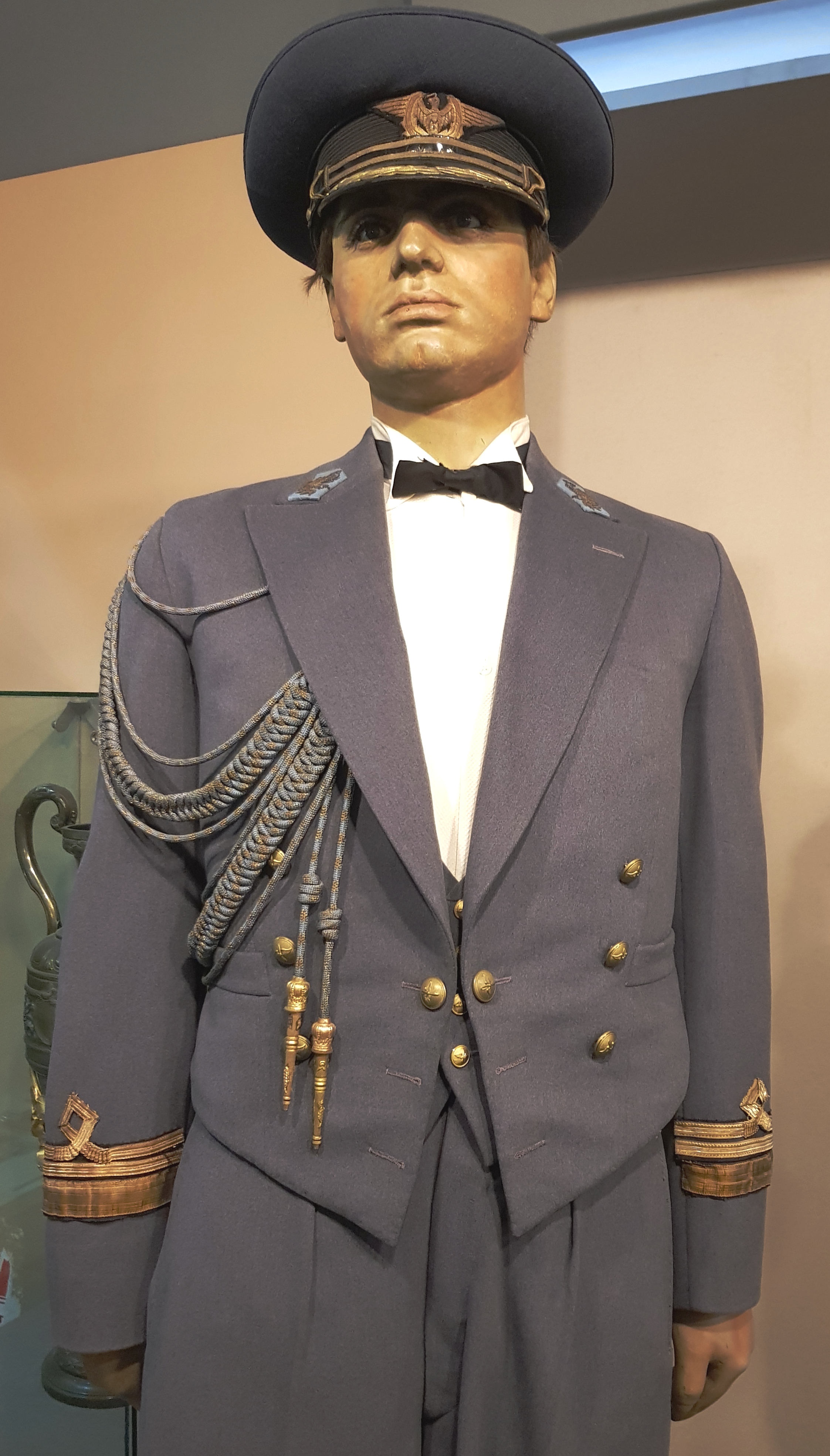 Jackett des Abendanzuges eines Oberstleutnants (Căpitan-Comandor) der rumänischen Luftwaffe in den 1930ern.